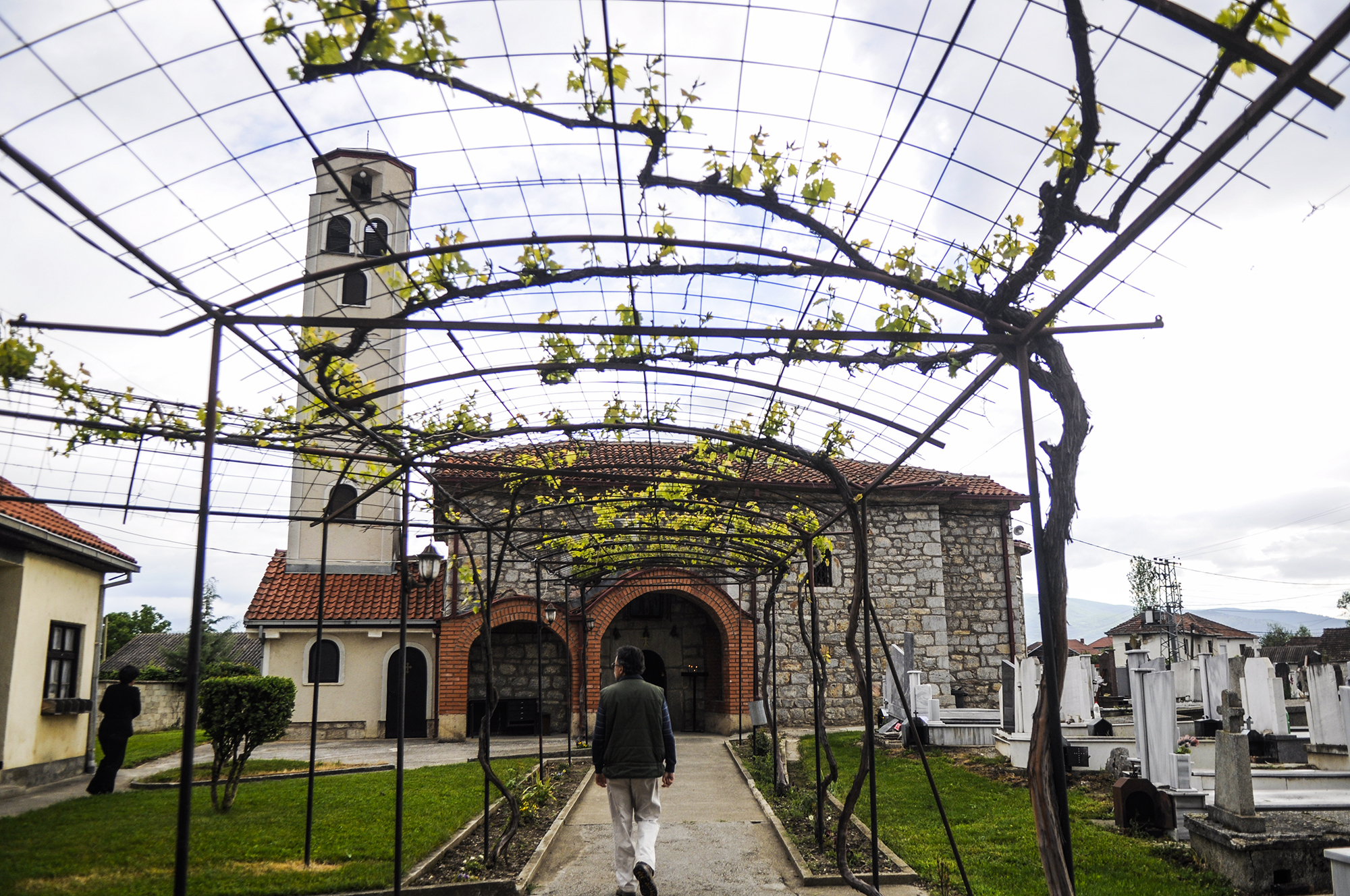 Црква „Св. Власиј“ - главната селска црква (осветена околу 1893 година)